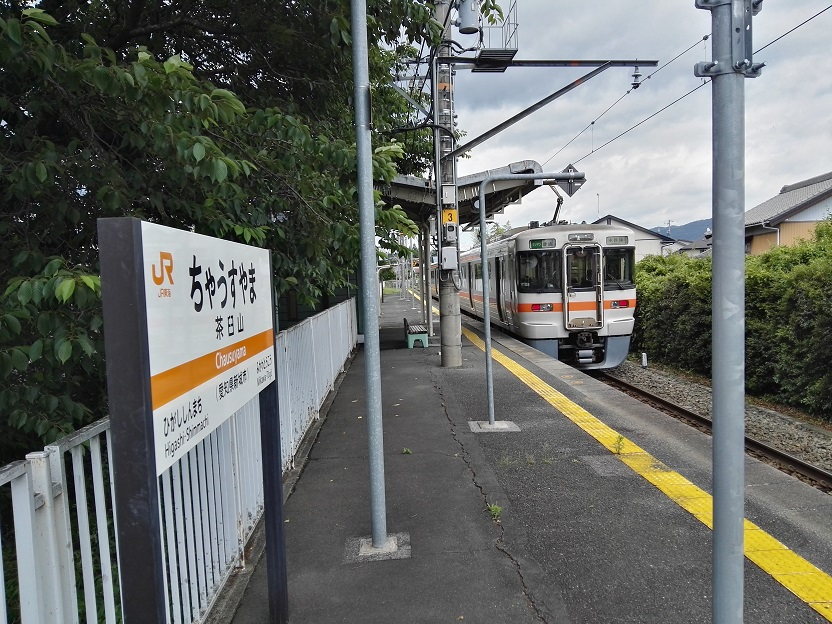 Chausuyama station platform